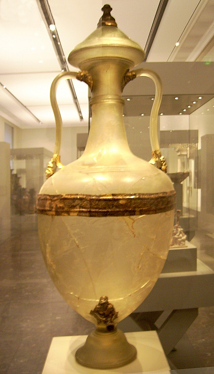 Hellenistische Glasamphora aus der 2. Hälfte des 2. Jahrhunderts v. Chr.; gefunden in Olbia; Antikensammlung Berlin/Altes Museum - seit 1913 - Inventarnummer 30219,254